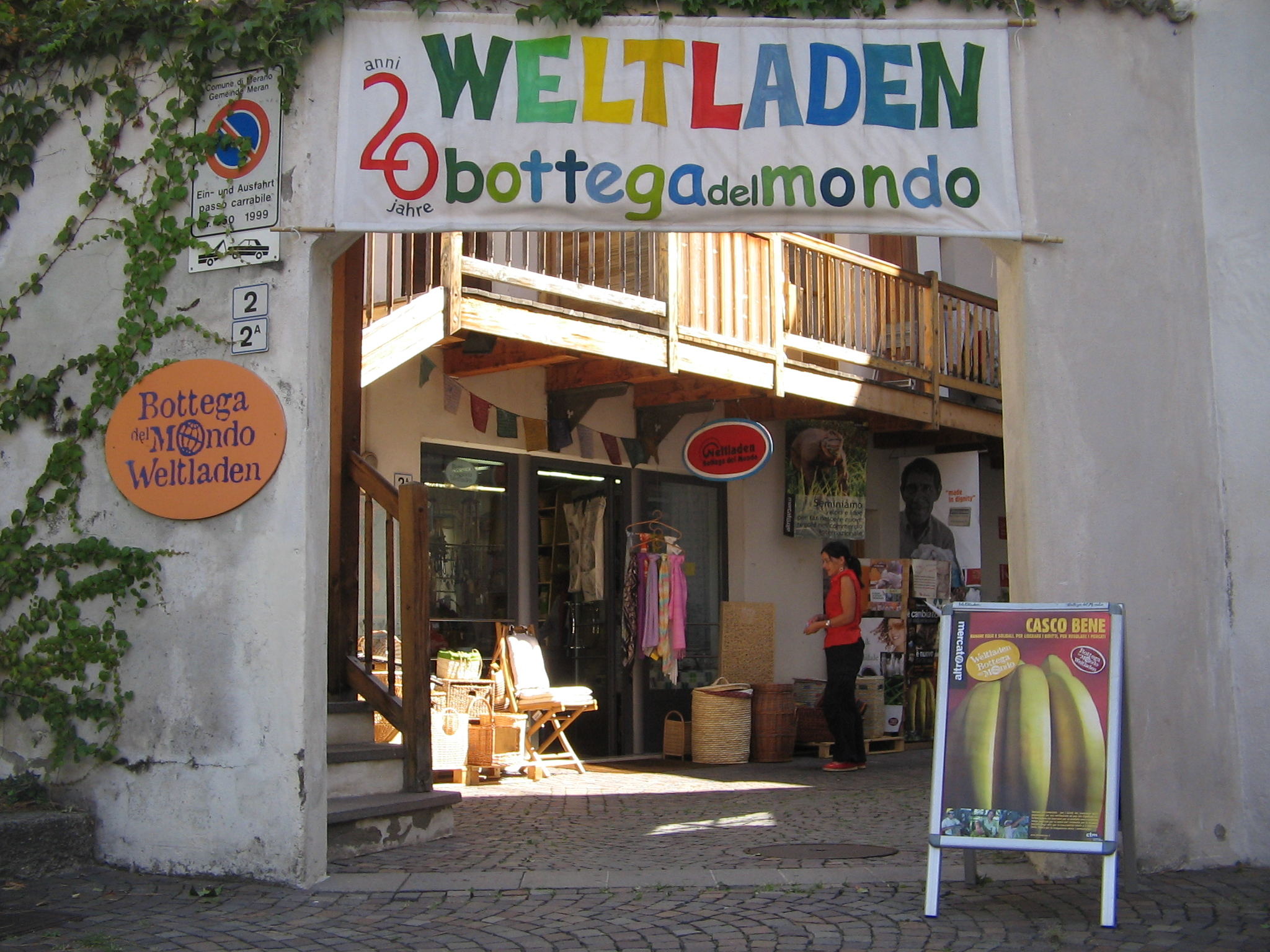 Mondbutiko en Merano Sudtirolo